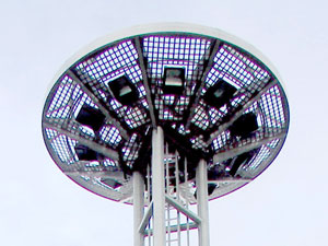 3 tripodes de 25 m. Plaine de sports - Pau